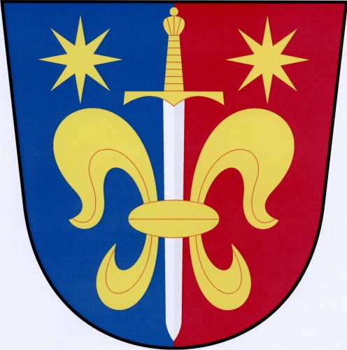 znak, Svojšice, okres Příbram